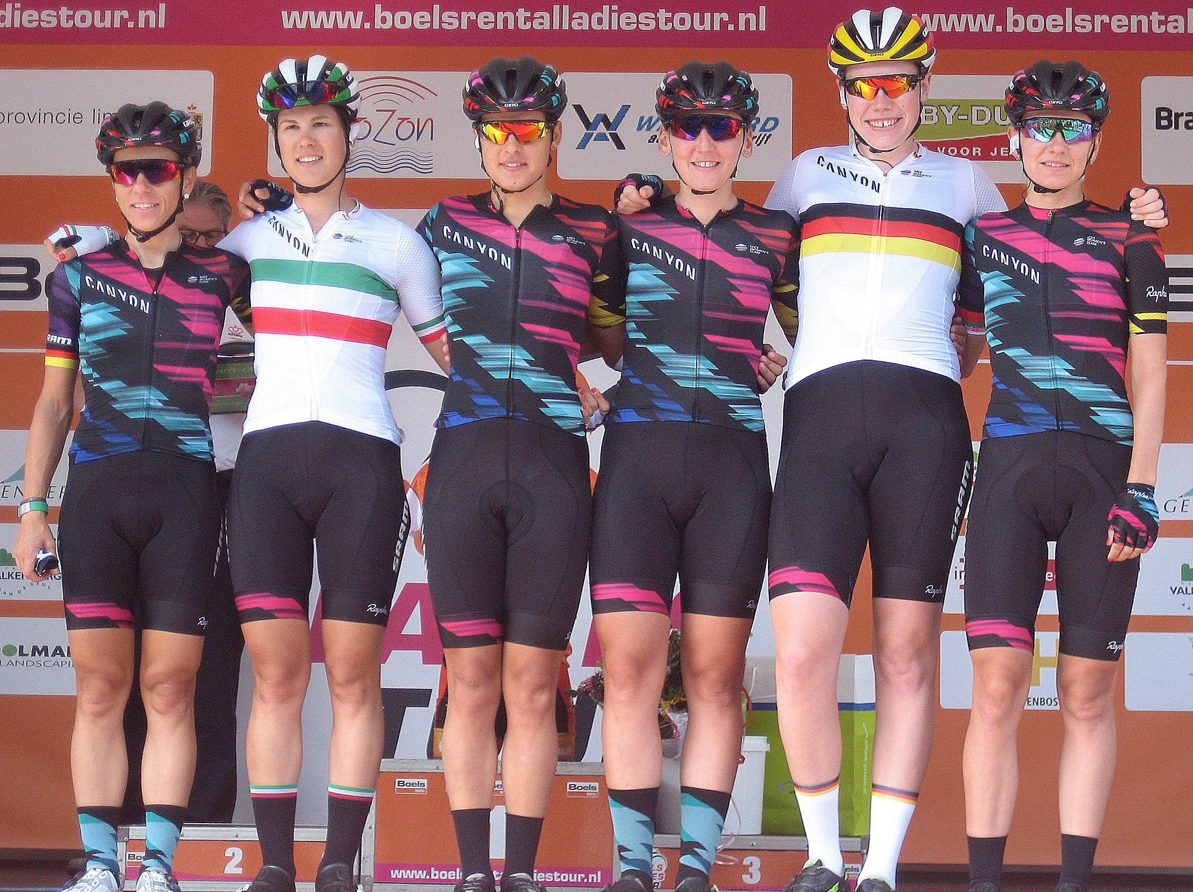 Team Canyon-SRAM voor start 3e etappe Holland Ladies Tour 2016